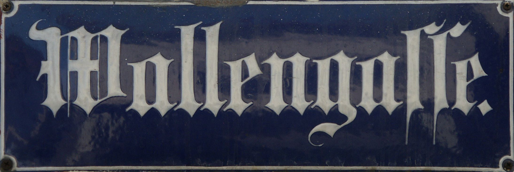 Straßenschild der Wallengasse